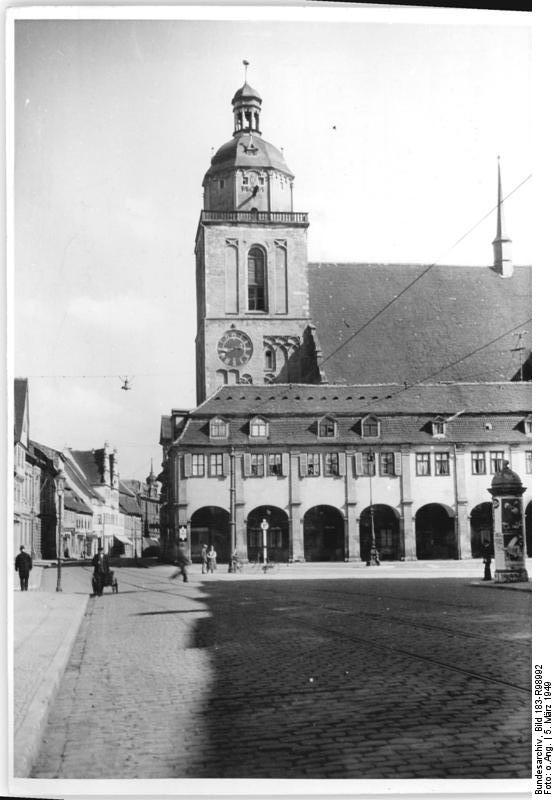 Dessau, Schlosskirche ADN-ZB Ho-Schm Schloßkirche in Dessau vor 1939 2885-49 5.3.1949